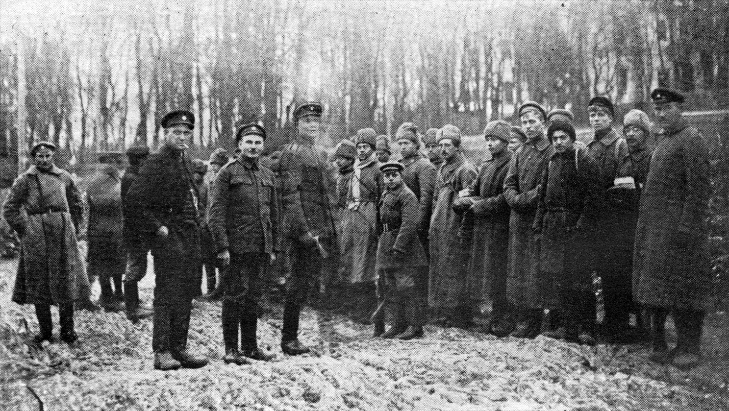 4. polgu poolt võetud sõjavangid Gostilitsõ külas novembri algul 1919.